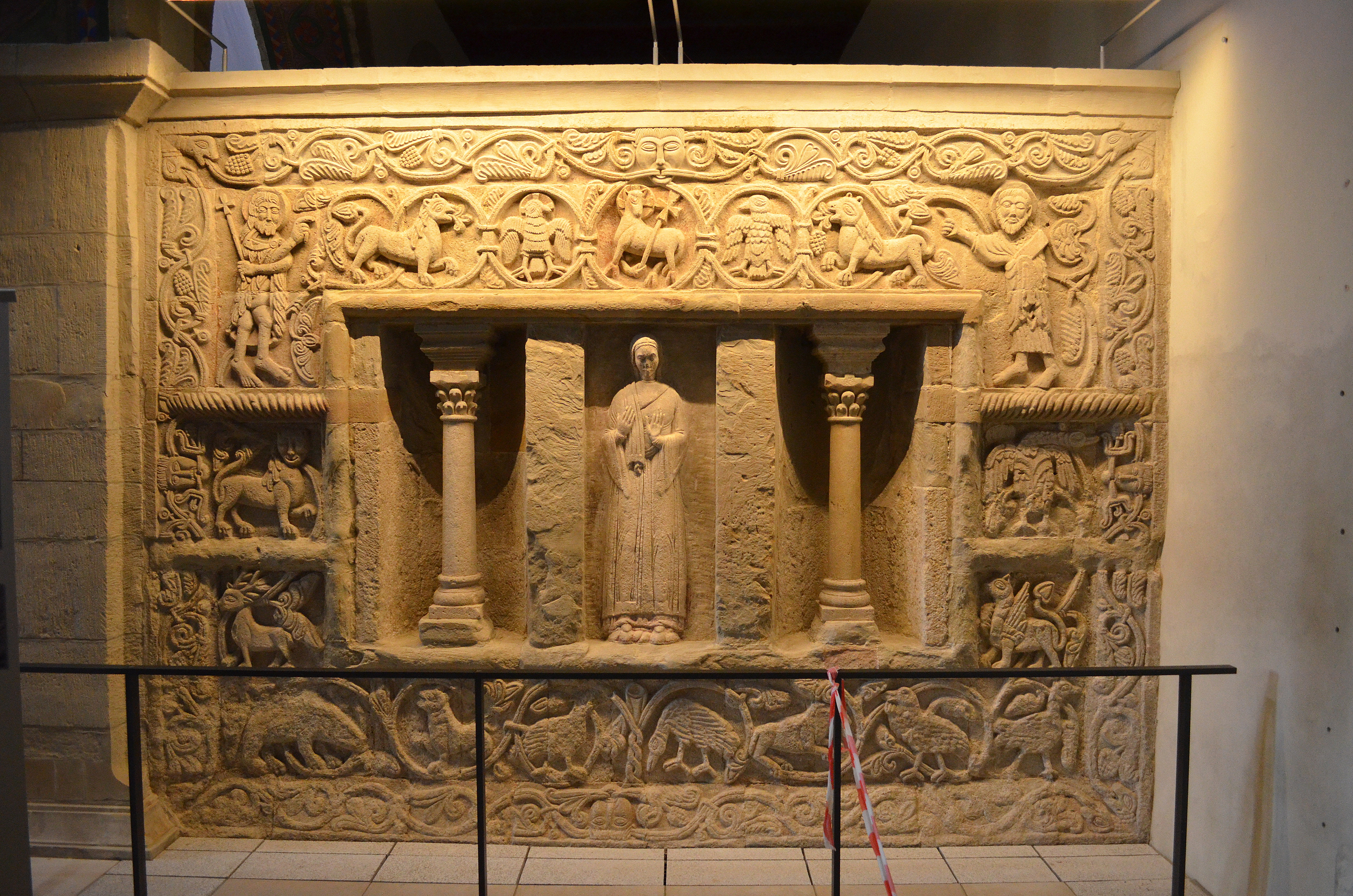 Stiftskerk Sint-Cyriacus Heilig Graf